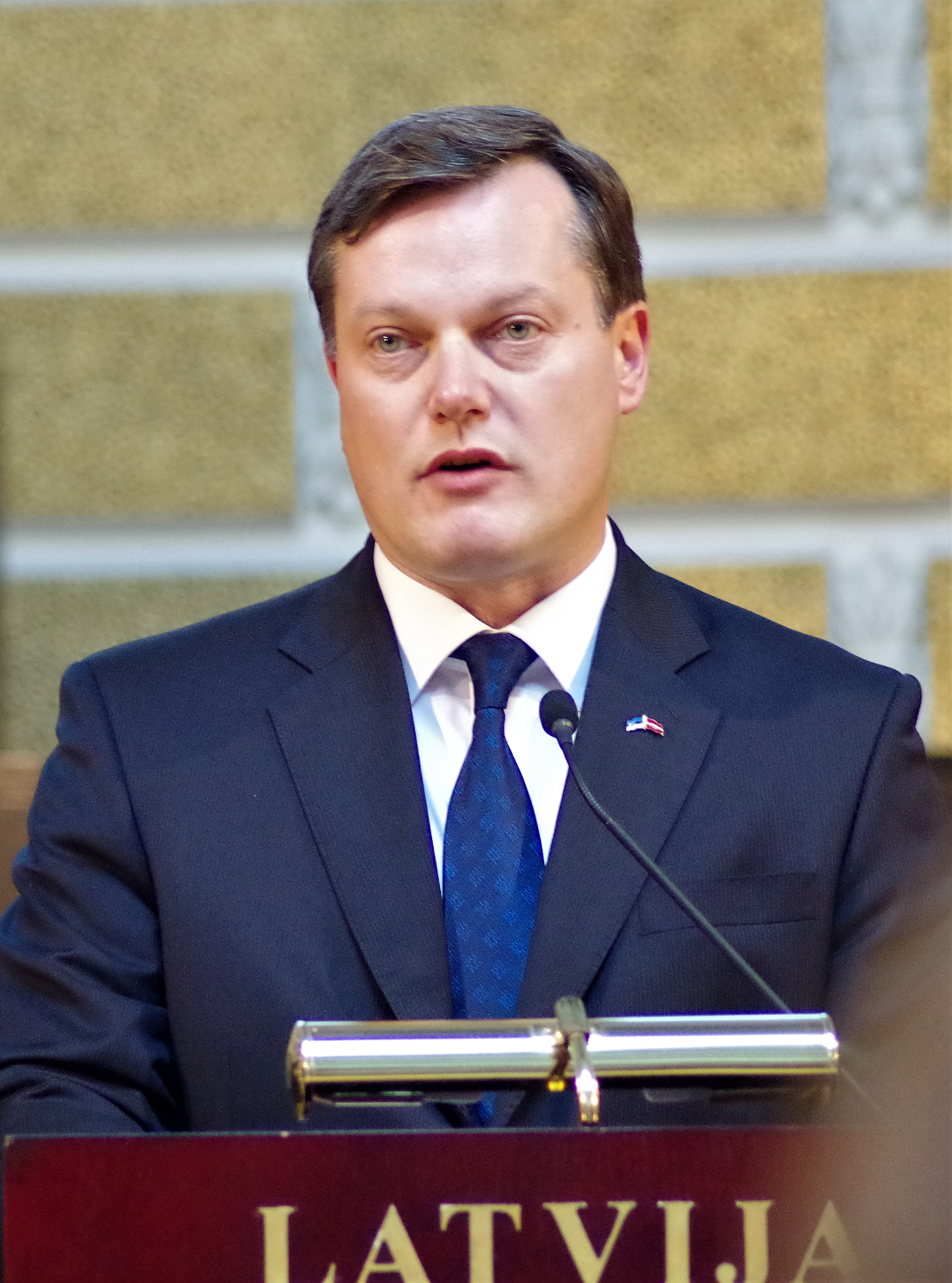 Arti Hilpus, Eesti diplomaat